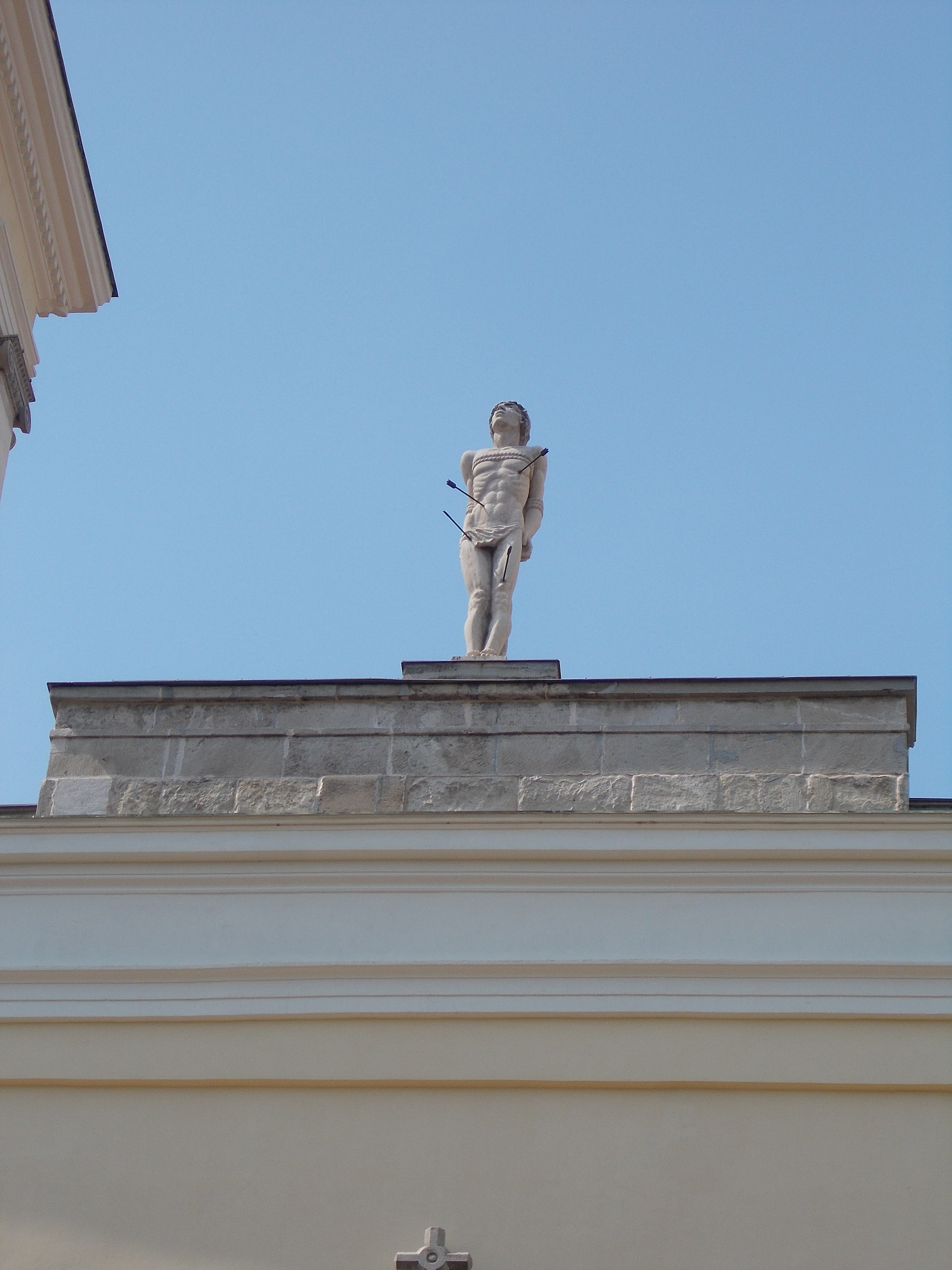 Felsővárosi római katolikus (Szt. Sebestyén) plébániatemplom. Műemlék ID 3868. A Szent Sebestyén templom oromzatán a Szent Sebestyén szobor (Braun János, 1978), kétszeres életnagyságú mészkő alkotás. - Magyarország, Fejér megye, Székesfehérvár, Móri utca This is a photo of a monument in Hungary, Identifier: 3868